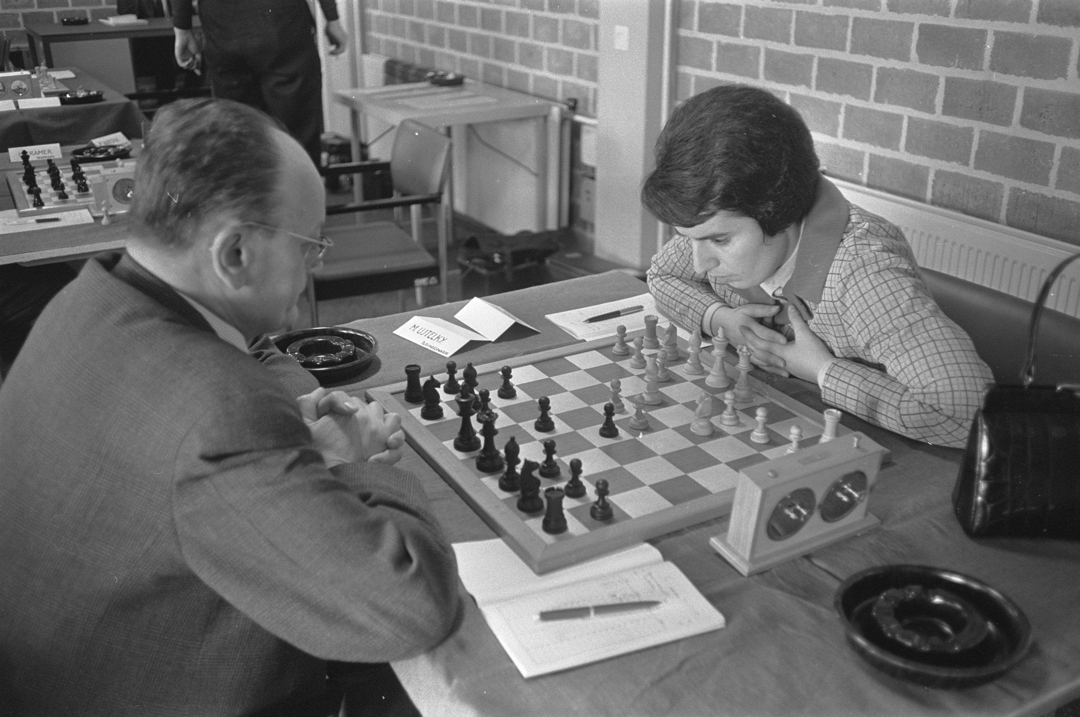 Collectie / Archief : Fotocollectie Anefo Reportage / Serie : [ onbekend ] Beschrijving : Hoogoven Schaaktoernooi. Mej. Nona Gaprindasvili (Sovjet-Unie, rechts) en M. Ujtelky (Tjechoslowakije) Datum : 14 januari 1969 Locatie : Wijk aan Zee Trefwoorden : schaken Persoonsnaam : Gaprindasvili, Nona, Ujtelky, M. Fotograaf : Koch, Eric / Anefo Auteursrechthebbende : Nationaal Archief Materiaalsoort : Negatief (zwart/wit) Nummer archiefinventaris : bekijk toegang 2.24.01.05 Bestanddeelnummer : 922-0138